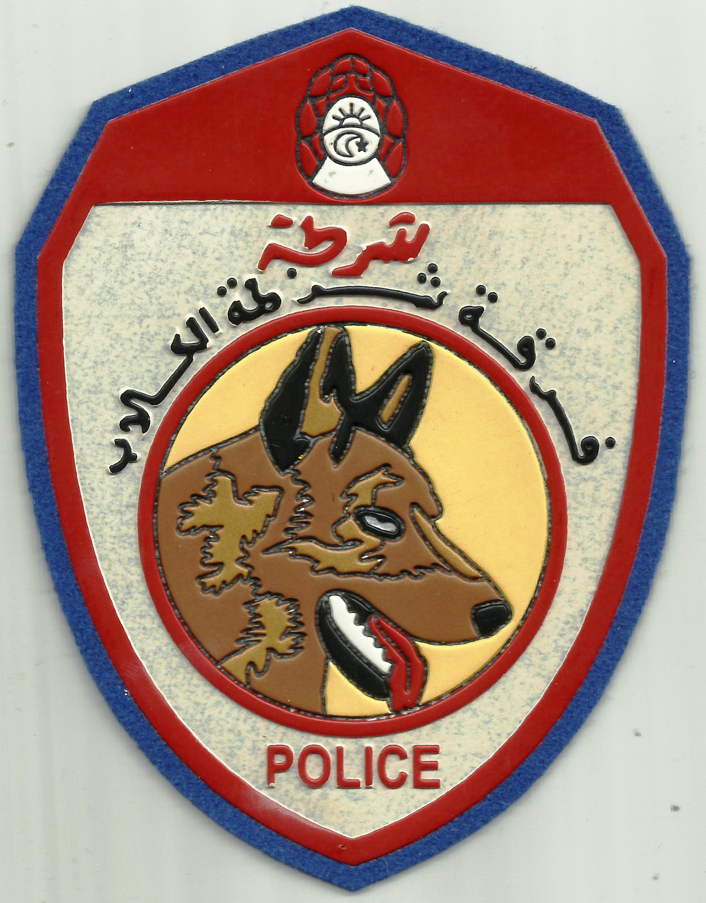 Politie patch uit Algerije